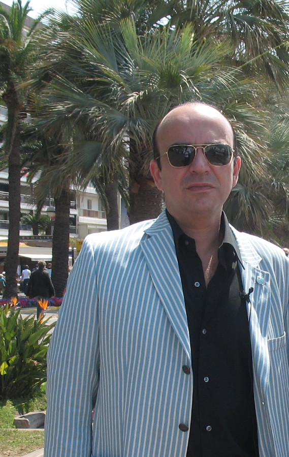 Karl Zéro au Festival de Cannes 2007.